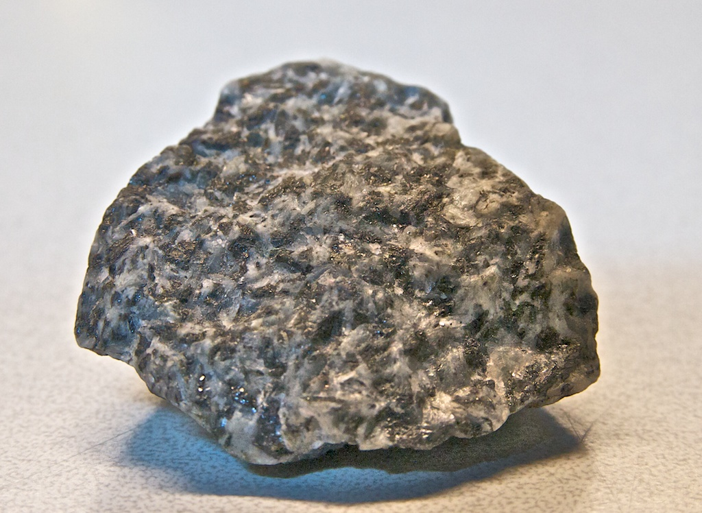 Diabaasi. Kuvattu näyte kuuluu Helsingin yliopiston geotieteiden ja maantieteen laitoksen geologian osaston kokoelmiin. The photographed specimen belongs to the collection of University of Helsinki, department of geosciences and geography, division of geology.